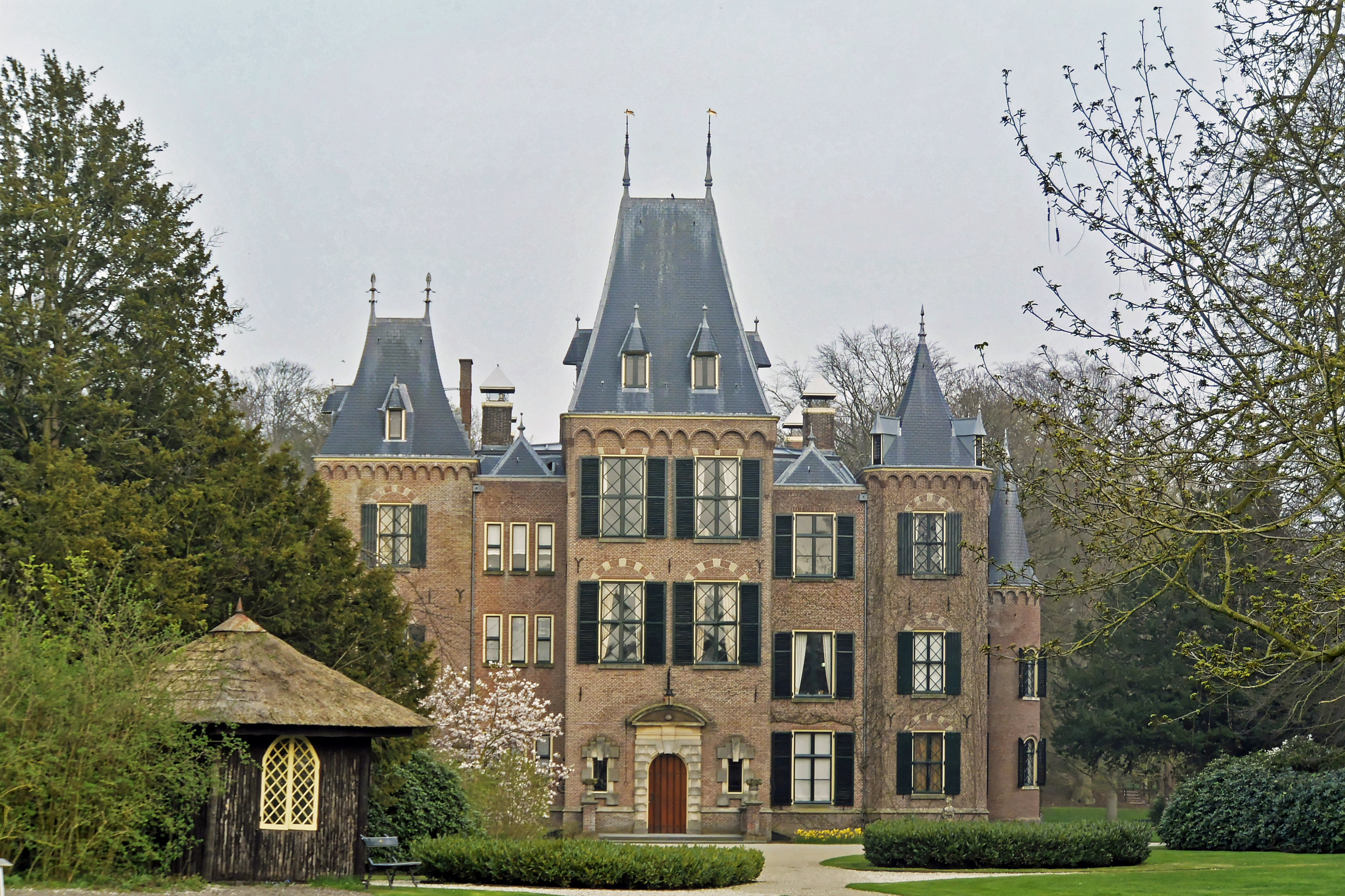 Le château de Keukenhof vu depuis le parc